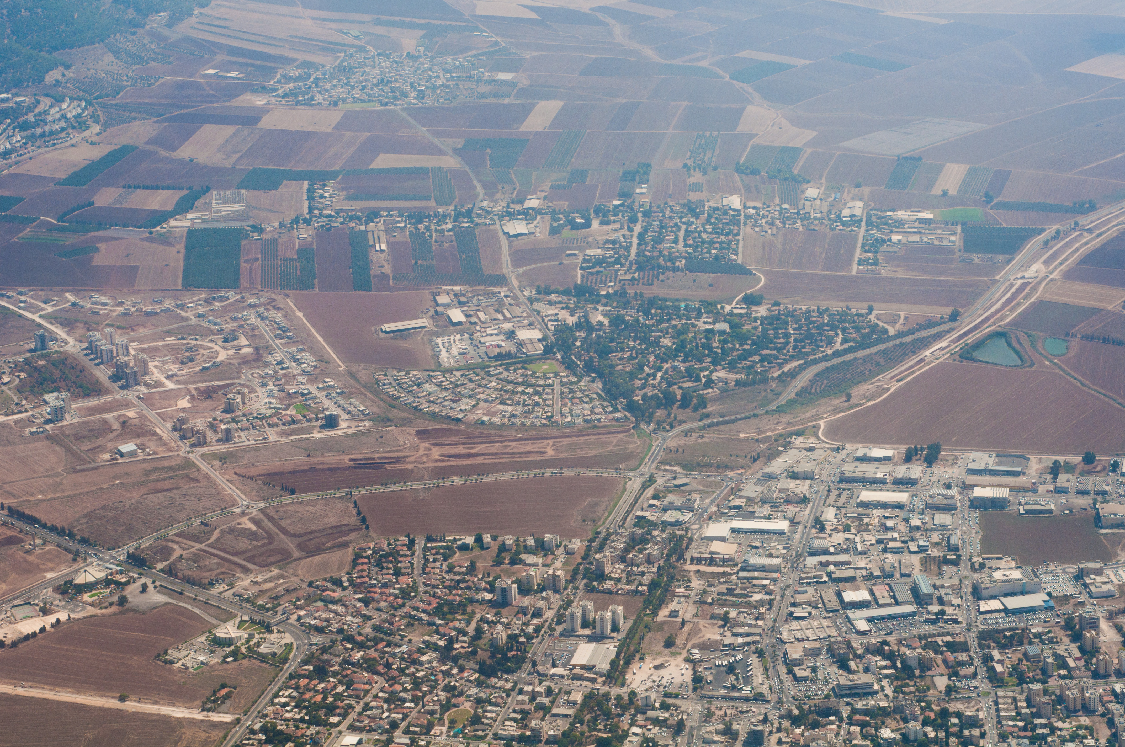 עפולה וקיבוץ מרחביה